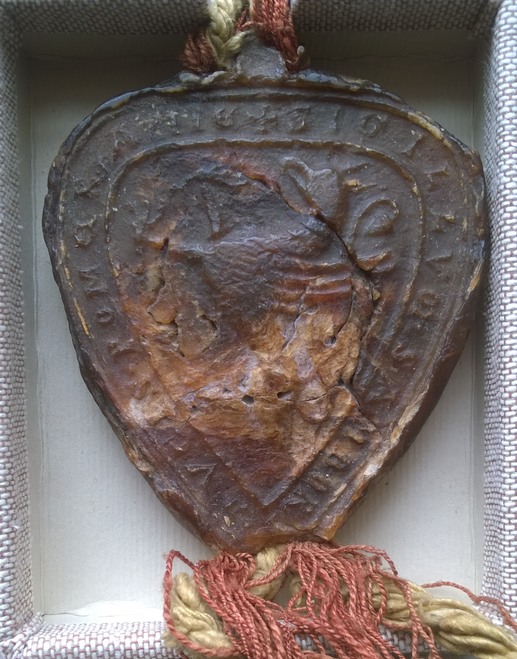 Pieczęć przywieszona na jedwabnym sznurze.